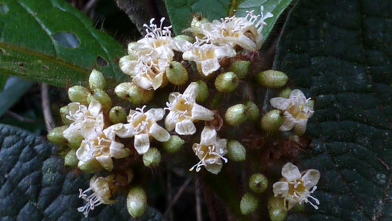 Cordia nodosa Lam.